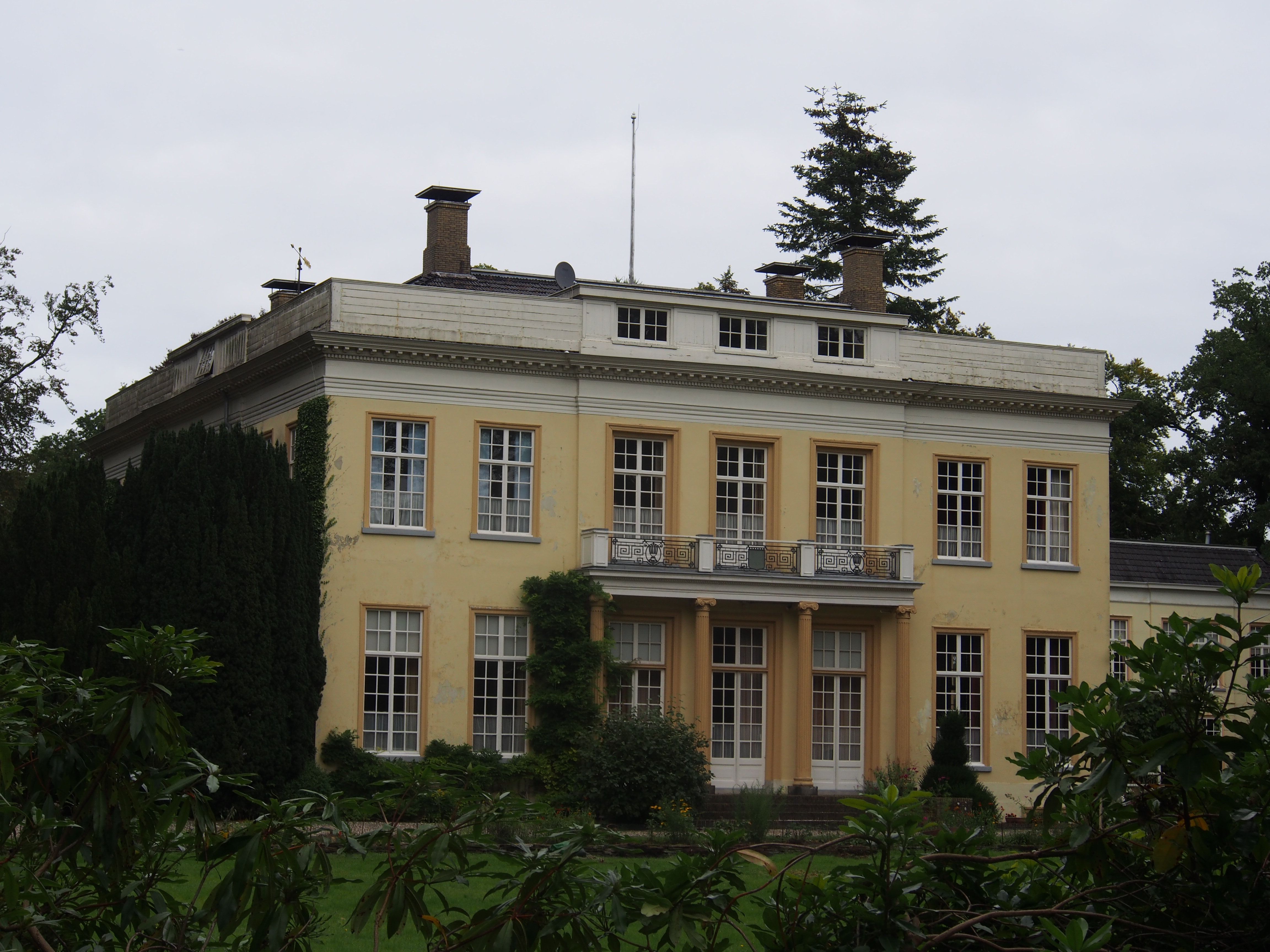 Harinxmastate, hoofdgebouw, Beetsterzwaag